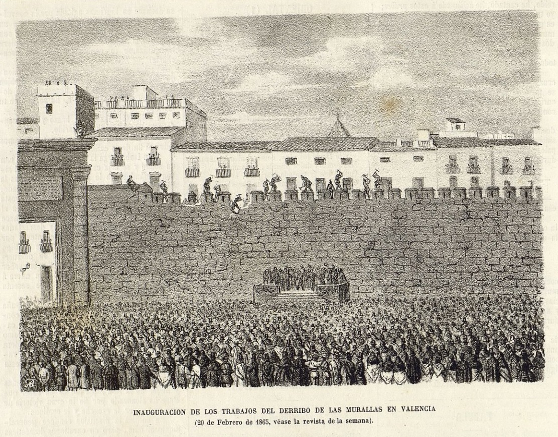 Inauguración de los trabajos del derribo de las murallas en Valencia (20 de febrero de 1865, véase la revista de la semana).